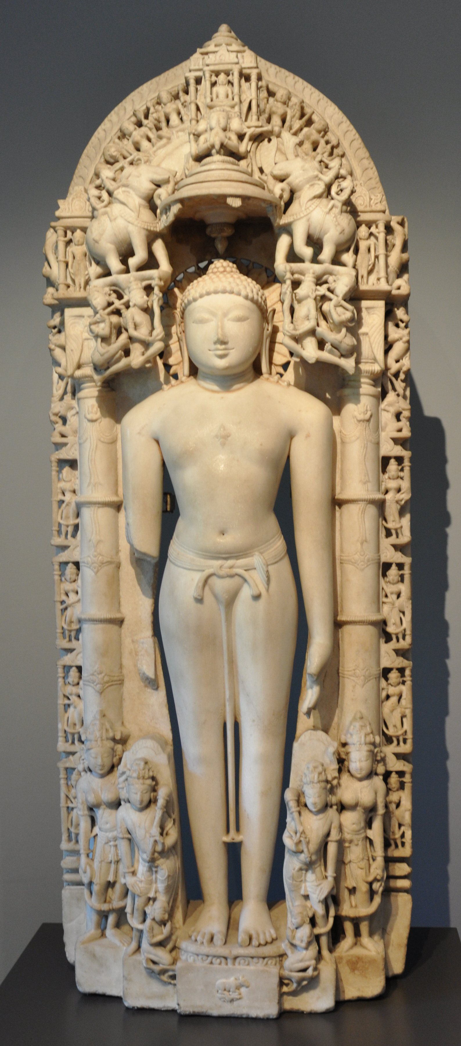 Tirthankara Rishabhanatha (der erste mystische Erlöser der Jainas); Indien, Rajasthan, Chandravati, 11./12. Jahrhundert; Marmor Museum Rietberg, Zürich; Geschenk Eduard von der Heydt; Inv. Nr. RVI 213